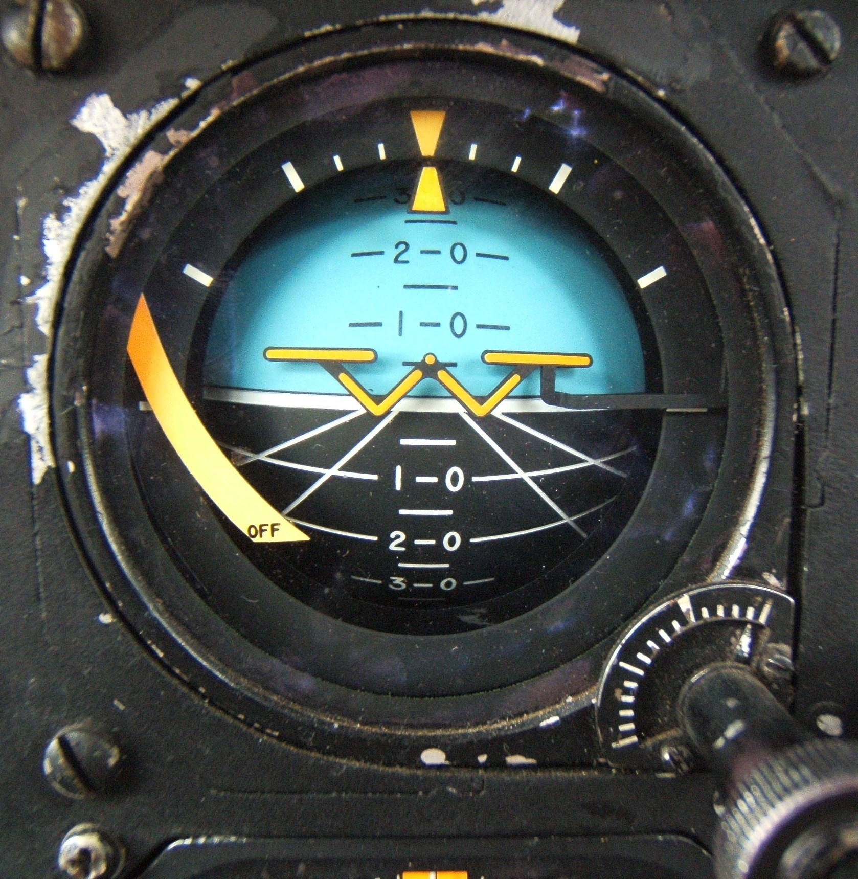 Horizonte artificial de un avión apagafuegos Canadair.